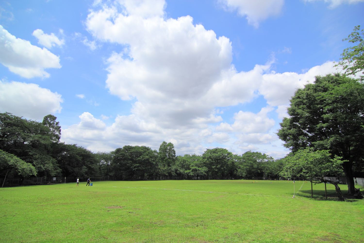 鶴間公園, Tsuruma Park